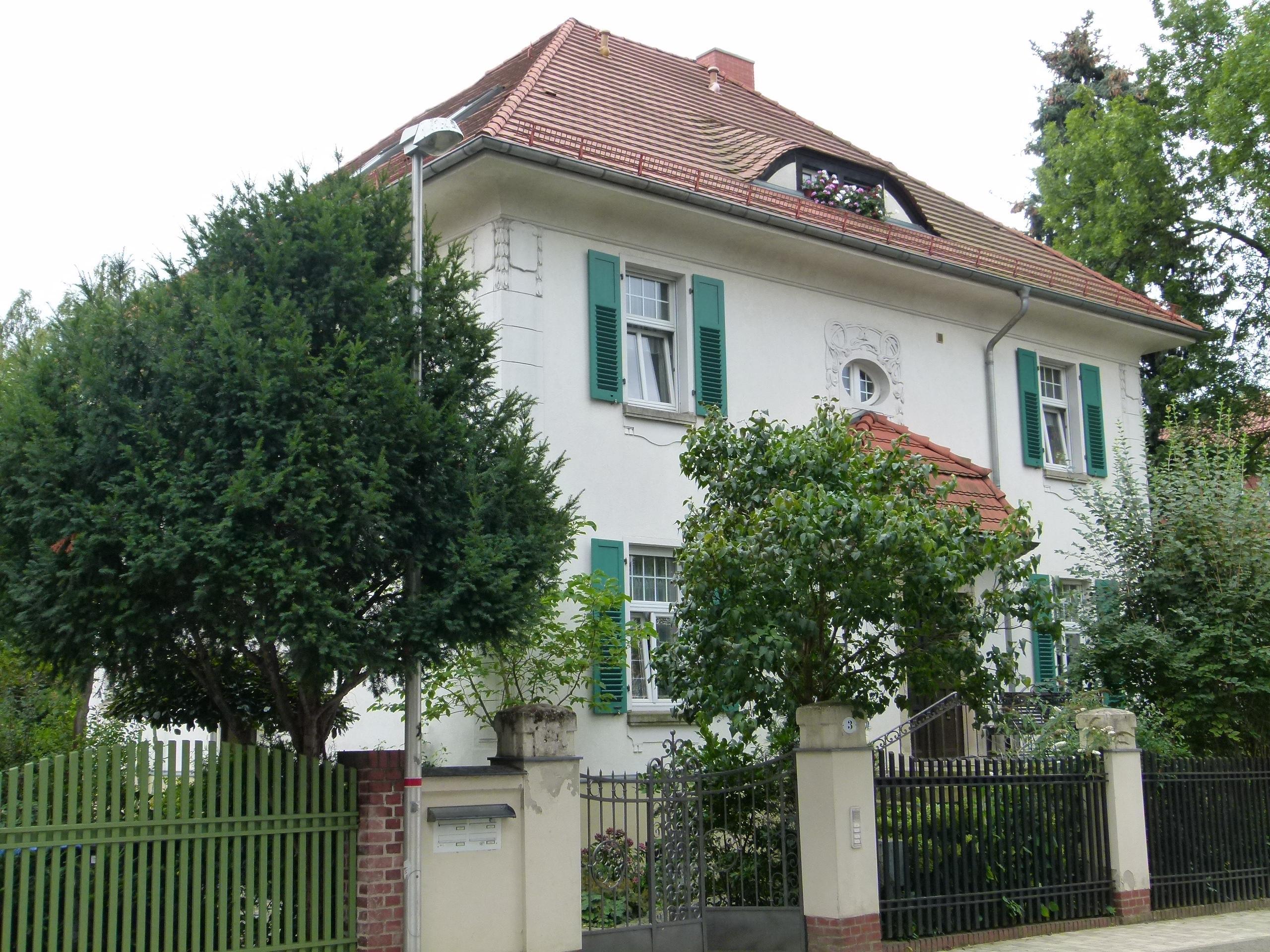 Denkmalgeschütztes Haus, Roseggerstraße 3, Radebeul, Sachsen